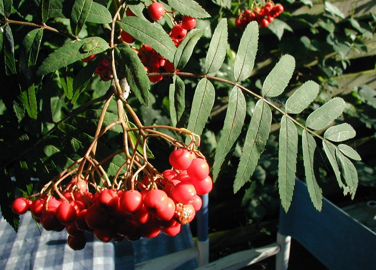 Sorbus aucuparia: Berries and leaves